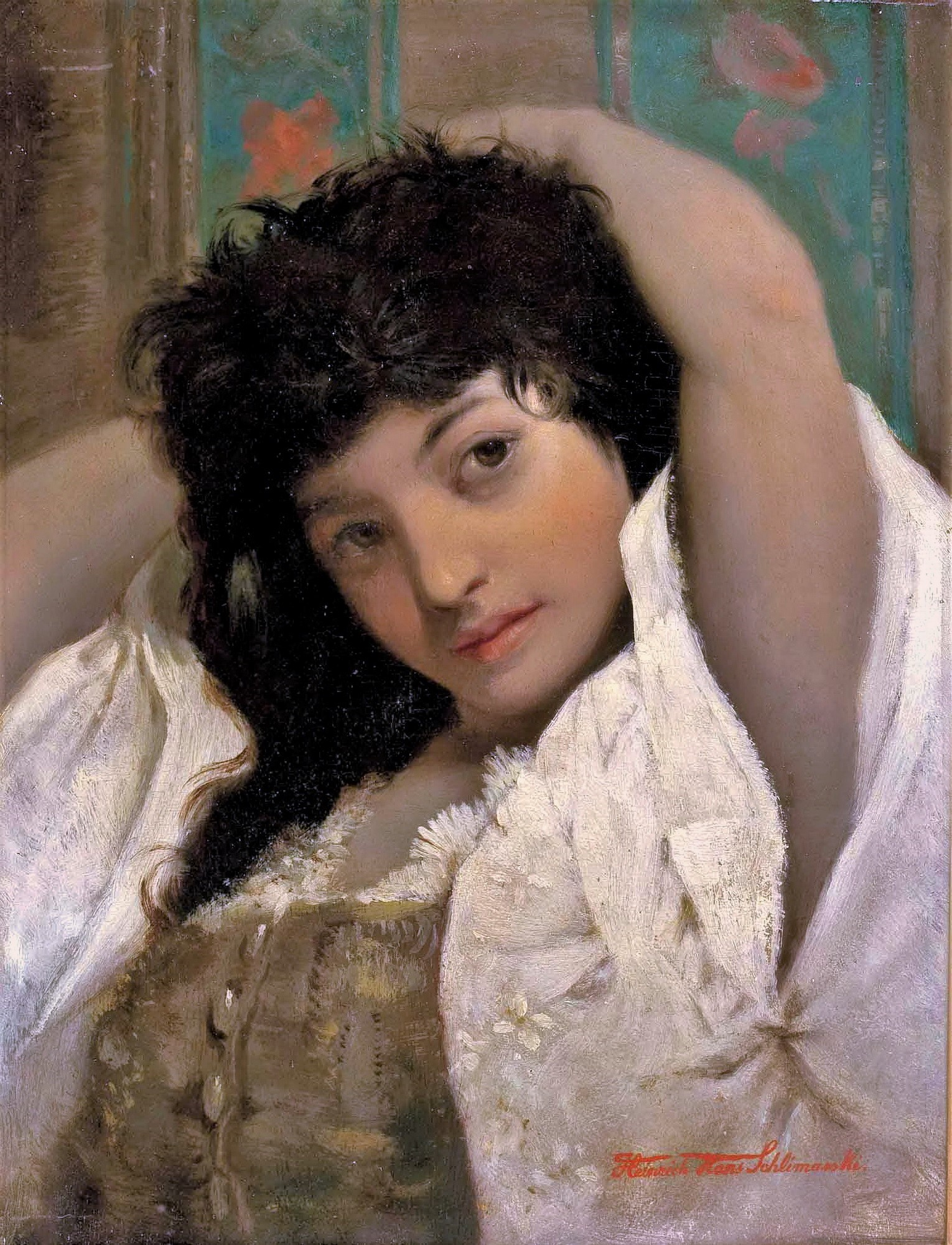 Coquette